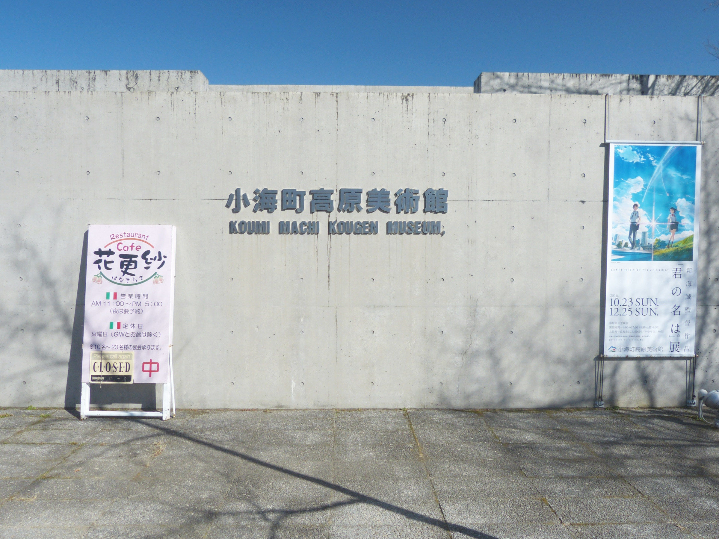 「君の名は。」展を開催中の小海町高原美術館 (新海誠監督の出身地、長野県小海町)